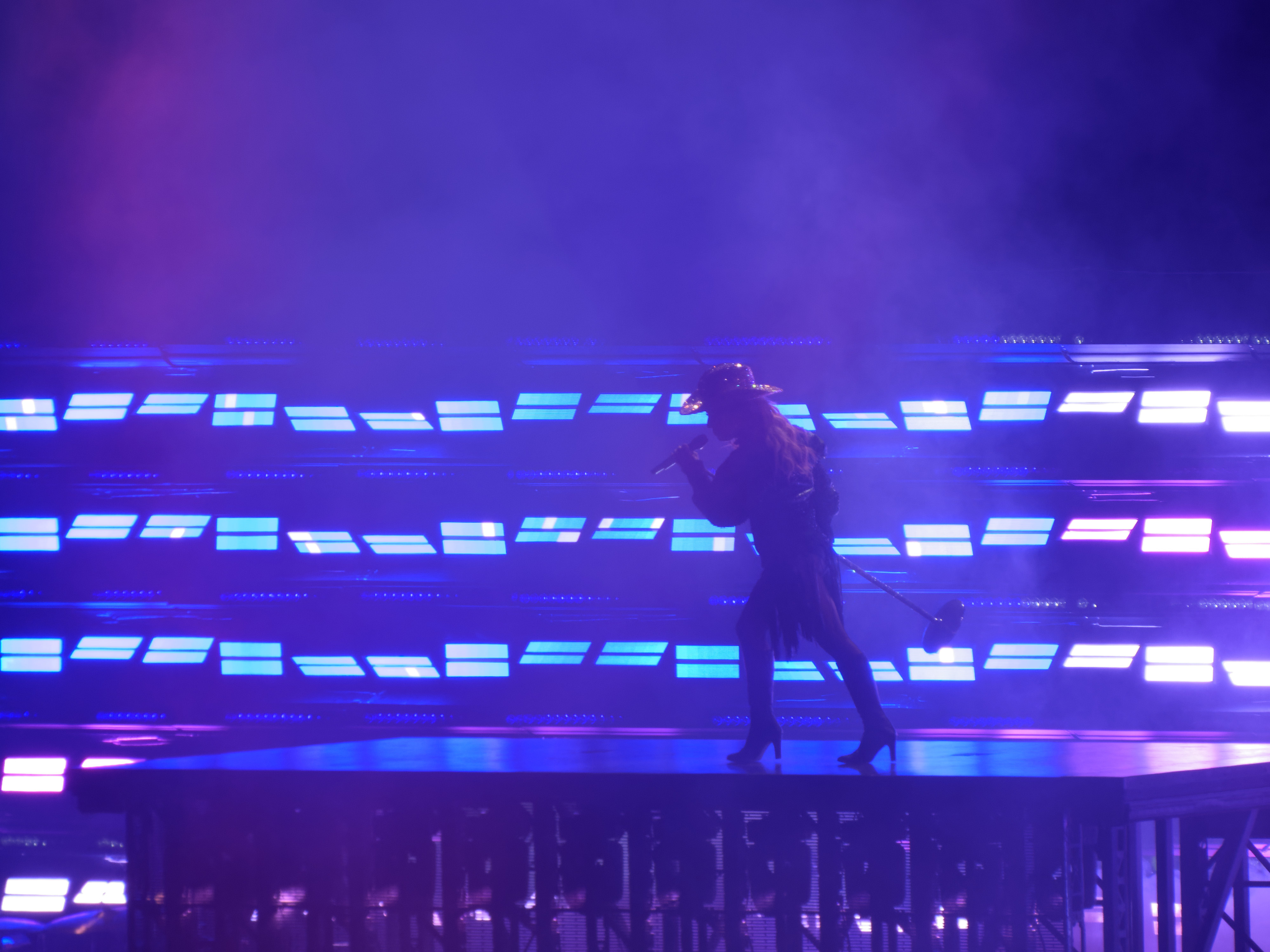 Lady Gaga performing "Diamond Heart" at Joanne World Tour in Tacoma